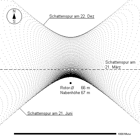 Einwirkbereich des Schattens einer Windenergieanlage Rotor-Ø 66m NH 67m